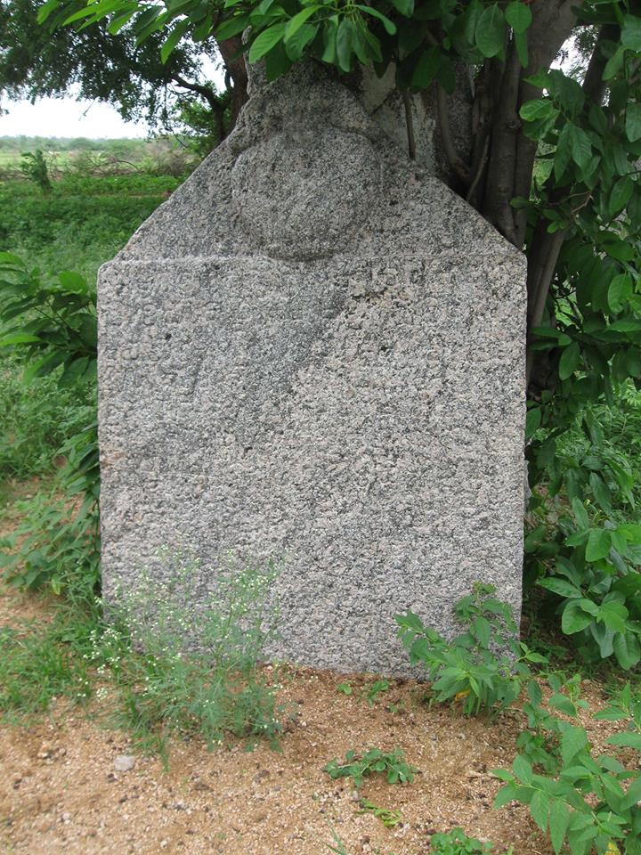 వెల్మజాలలోని శాసనం